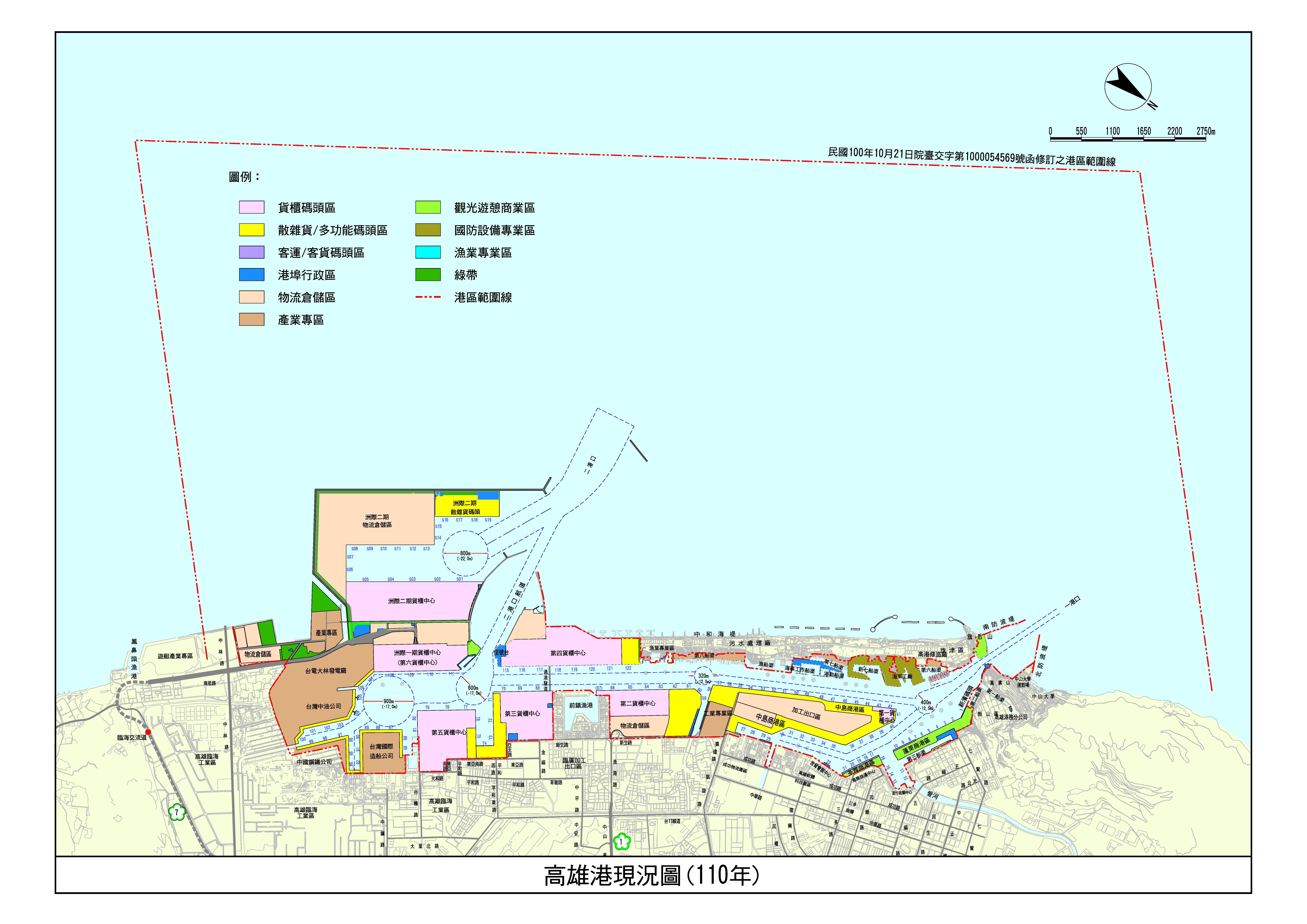 高雄港區碼頭地圖